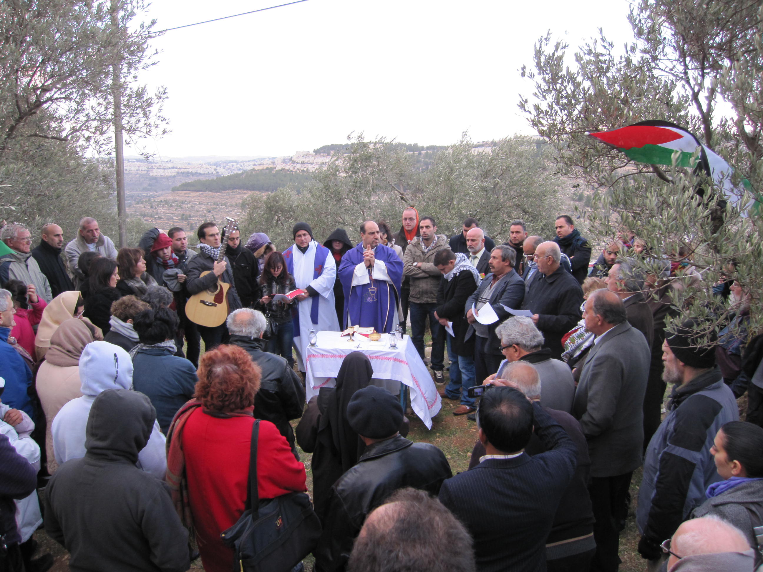 Demonstratieve H. Mis van Palestijnse katholieken in de open lucht in de Cremisan valei waar de Muur de plaatselijke christelijke gemeenschap in tweeën zal splitsen en het klooster zal afscheiden van die gemeenschap. Bij het klooster zijn wijgaarden waar o.m. een beroemde Miswijn wordt geproduceerd. De Cremisan vallei ligt precies tussen de Westelijke Jordaanoever en Jeruzalem. De vallei vormt een van de laatste groene gebieden in het Bethlehem district, met landbouwgronden en recreatiemogelijkheden. Het klooster behoort aan van de zusters Salesianen. Ook hun school en de wijnkelders van Cremisan bevinden zich in de vallei.